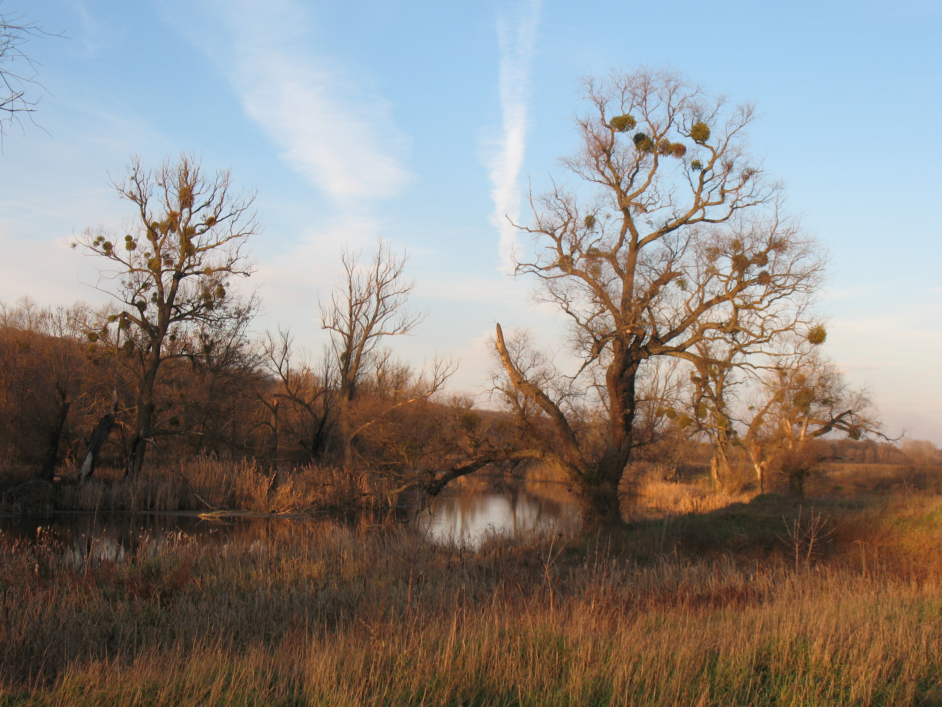 Мохначанский луг на правом берегу Донца. Старица Северского Донца. Деревья, поражённые омелой. Вид от реки через старицу на Мохначанский лес.